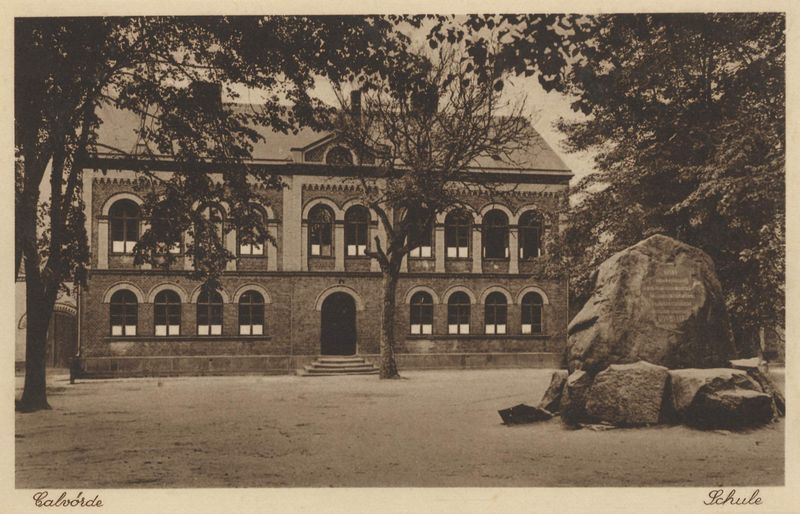 Ansichtskarte um 1900, zeigt Marktplatz, Gedenkstein und Schule in Calvörde